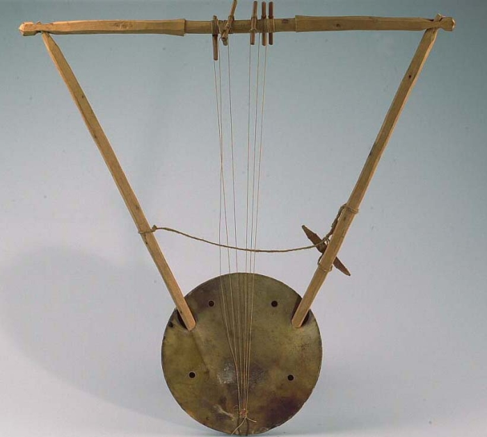 Deze lier heeft een schaalvormige klankkast, bedekt met leer waarin een aantal klankgaten zitten. De klankkast is gemaakt van een geëmailleerde ijzeren schotel (zg. 'tweede gebruik'). Het driehoekige frame bestaat uit 2 armen in V-vorm en een dwarsstok (juk). De 6 snaren lopen binnen dit frame via een kam naar het juk, waar ze gespannen worden en vastgezet met stukjes hout (stelschroeven). De lier wordt bespeeld met een stukje leer (plectrum), dat met een touwtje aan het instrument gebonden is. (De kam ontbreekt.)